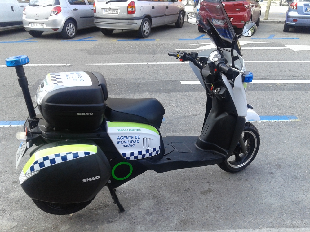 Dentro de la política del Área de Medio Ambiente y Movilidad de renovación de la flota municipal con vehículos poco o nada contaminantes, y de apuesta por el vehículo eléctrico, se acaba de adjudicar el contrato de adquisición de 13 motos eléctricas para el cuerpo de Agentes de Movilidad por importe de 113.256 euros. Las nuevas motocicletas Scutum, modelo Silence S02 en versión policial, tienen una autonomía de 100 kilómetros y están especialmente diseñadas para facilitar el trabajo diario de vigilancia de la circulación en la ciudad de forma eficiente y con un coste de consumo mínimo, ya que permiten ahorrar más de 500 euros cada 10.000 kilómetros.